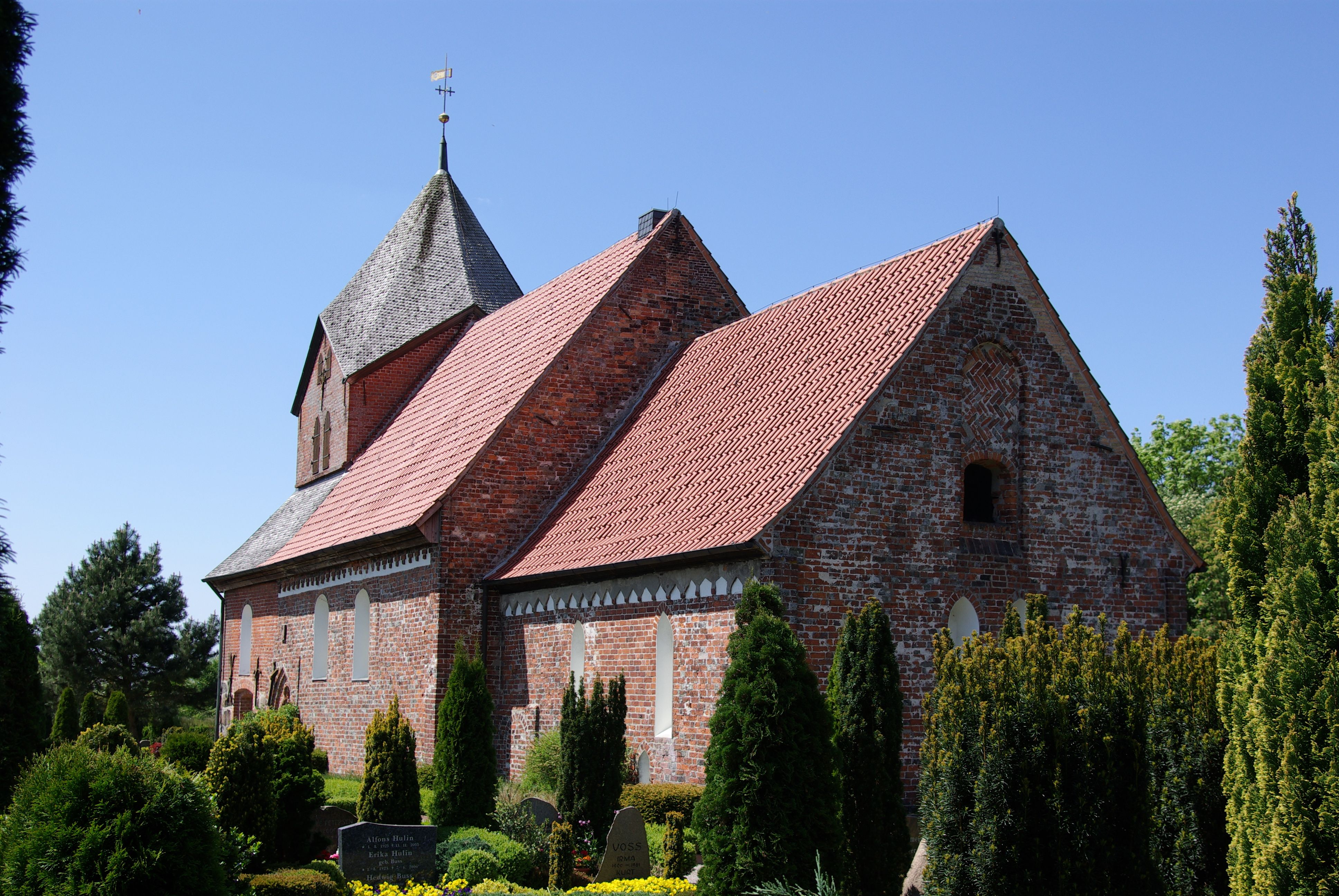 Husum, Stadtteil Schobüll, die Kirche "Kirchlein am Meer" von Osten betrachtet (Geotags in den exif-Daten)